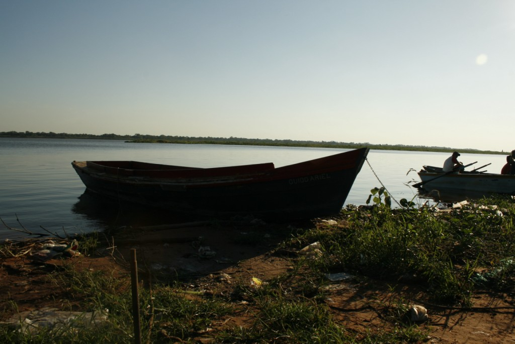 Rio Paraguay. Ciudad de San Antonio